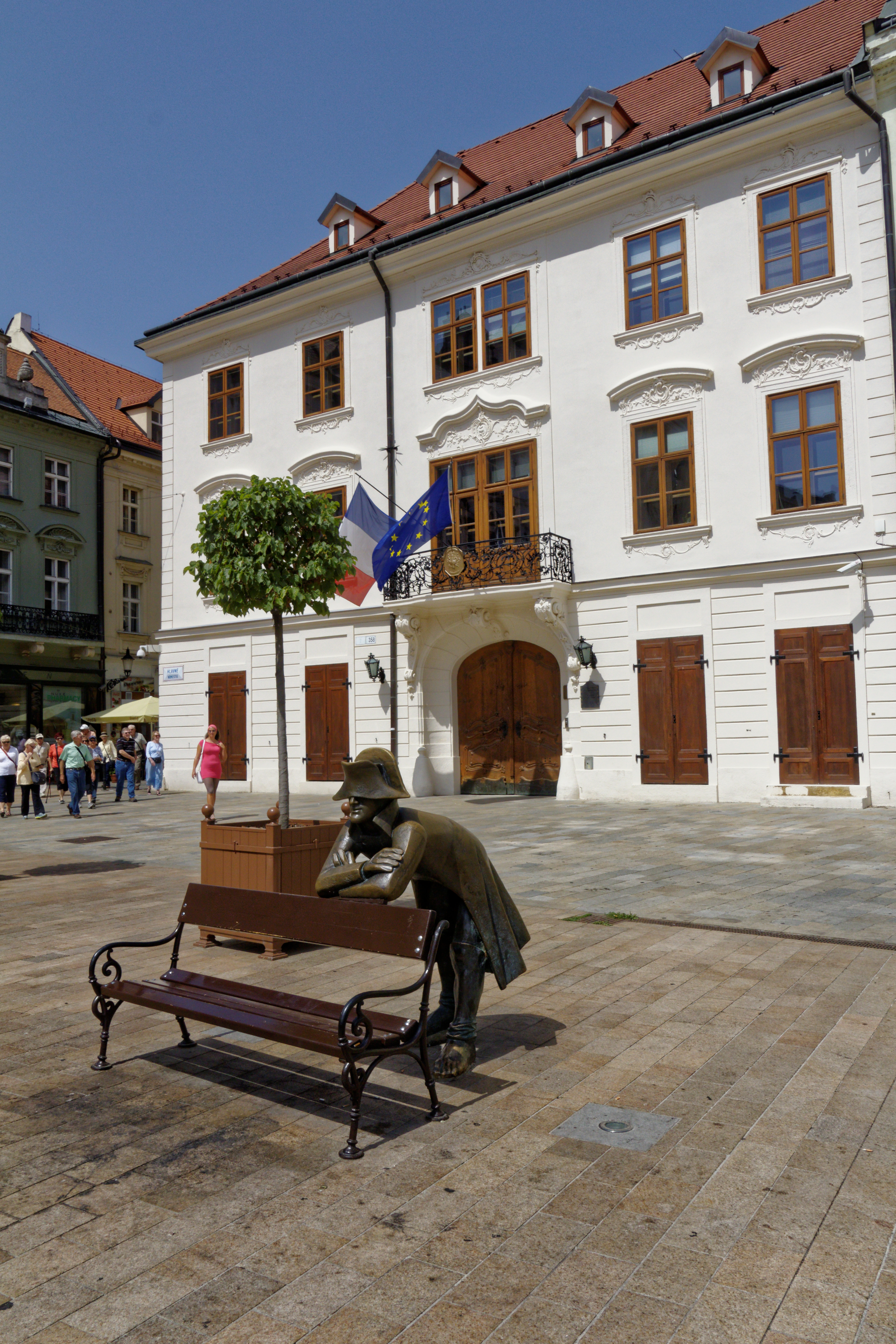 Bratislava; Französische Botschaft. Im Vordergrund Statue Napoleon's